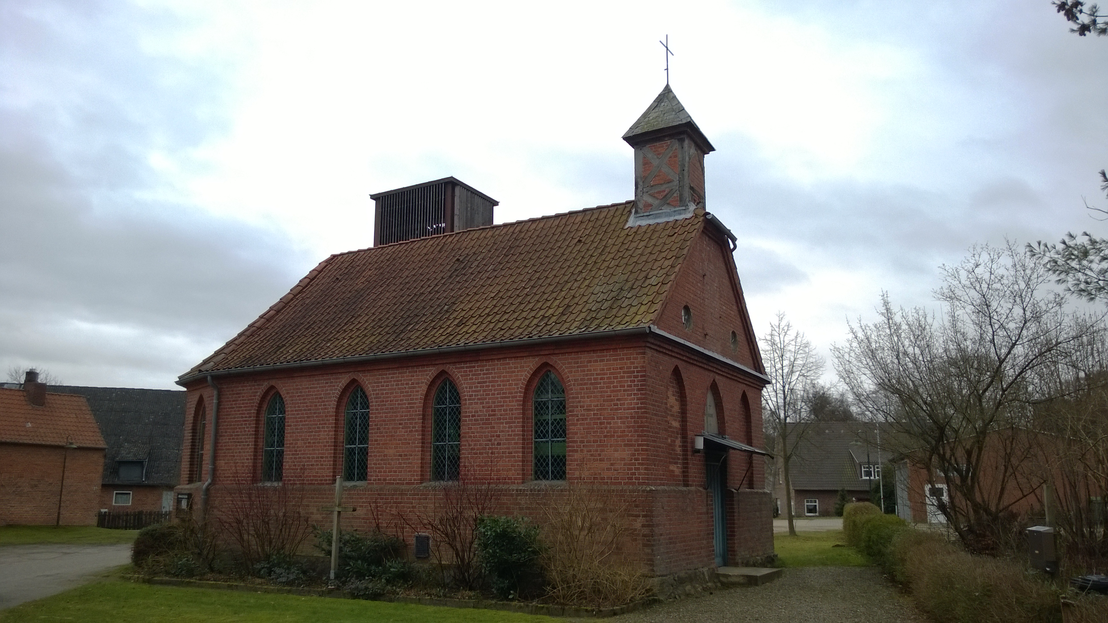 Kapelle in Wootz (Lüchow-Dannenberg)